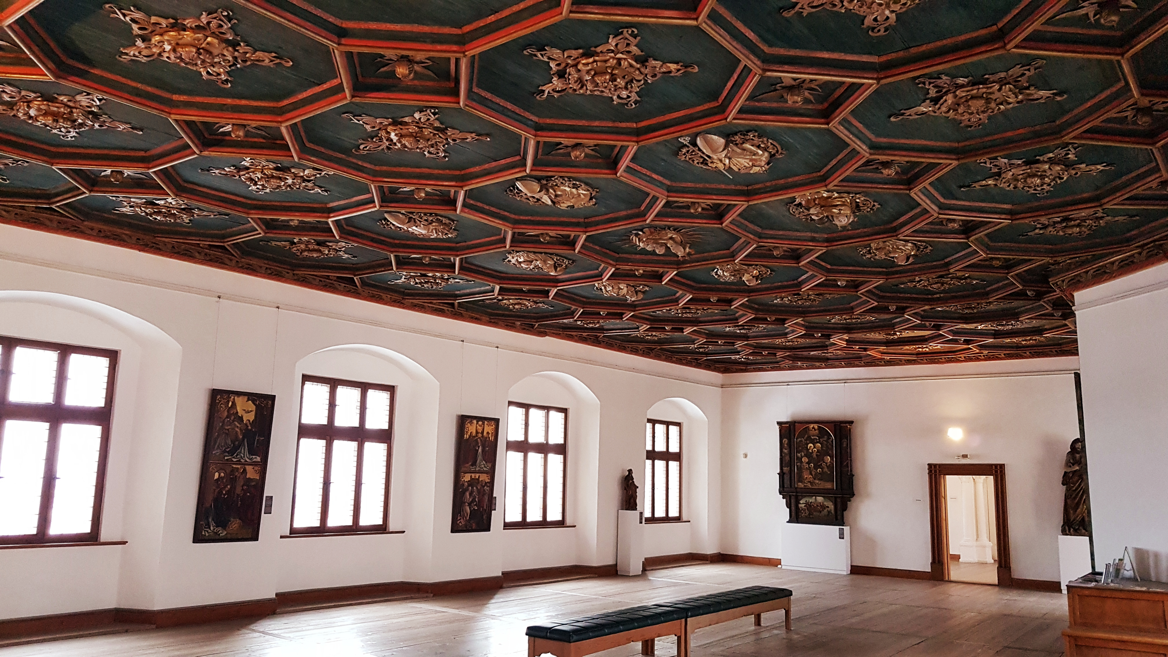 Hohes Schloss (Füssen), Rittersaal, Hauptausstellungsraum der Staatsgalerie